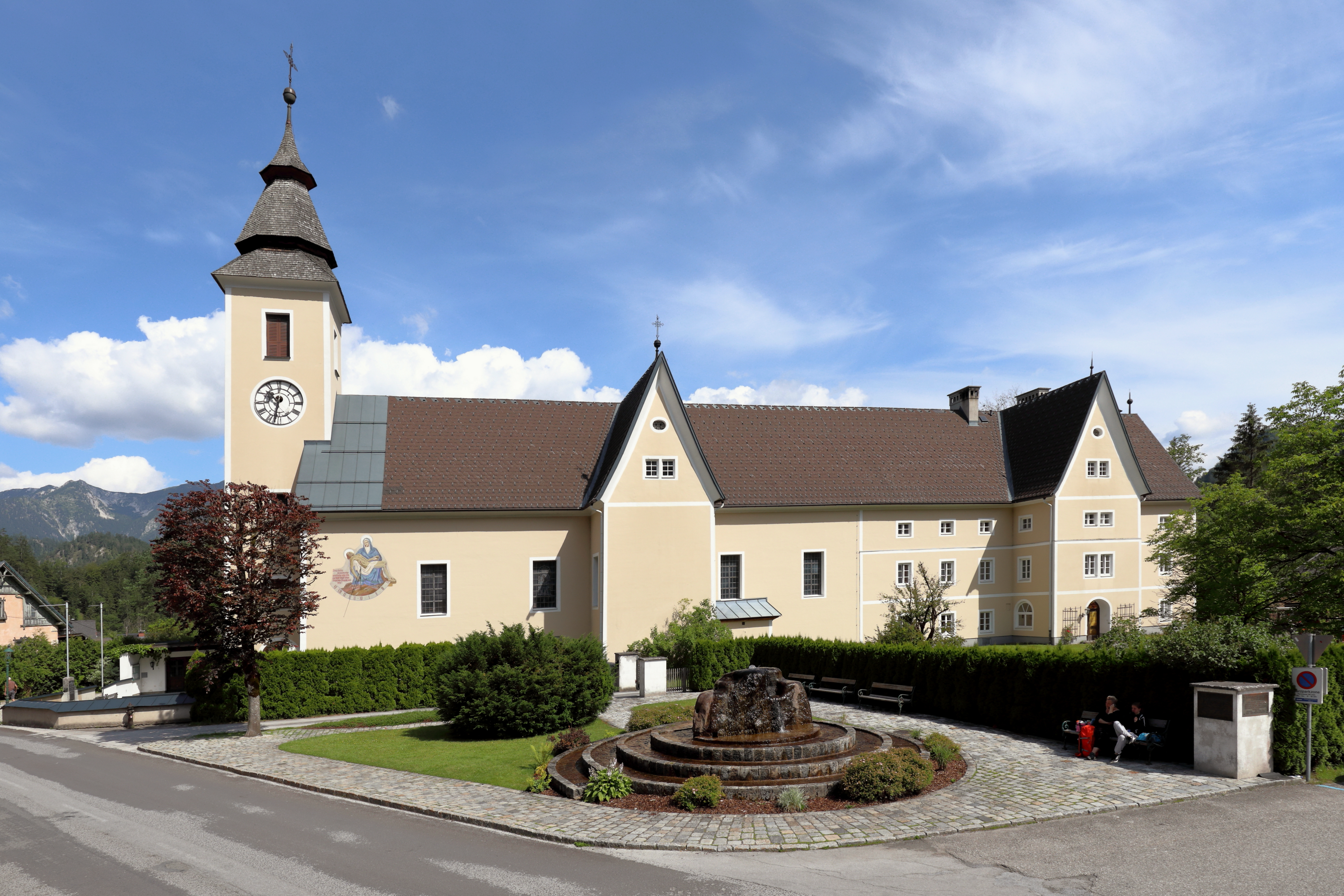 Südansicht der röm.-kath. Pfarrkirche hl. Barbara mit dem angebauten Pfarrhof in der steiermärkischen Gemeinde Wildalpen.Ursprünglich wurde in den 1670er Jahren eine Kapelle gebaut. 1727 erhielt Wildalpen einen eigenen Seelsorger (Pater Gallus Schröckenfux) und 1729 wurde Wildalpen offiziell zur Pfarre erhoben. Am 20. August 1728 erfolgte die Grundsteinlegung für die heutige Kirche, die am 7. Oktober 1731 geweiht wurde, inklusive Übertragung eines Gnadenbildes von der Thalkapelle in die Kirche. Die Kirche hat eine Länge von rd. 35 m. Weil ein etwa gleich langer Pfarrhof direkt ostseitig angebaut und mit einem gemeinsamen Dach verbunden ist, hat der Baukomplex ein stattliches Erscheinungsbild.